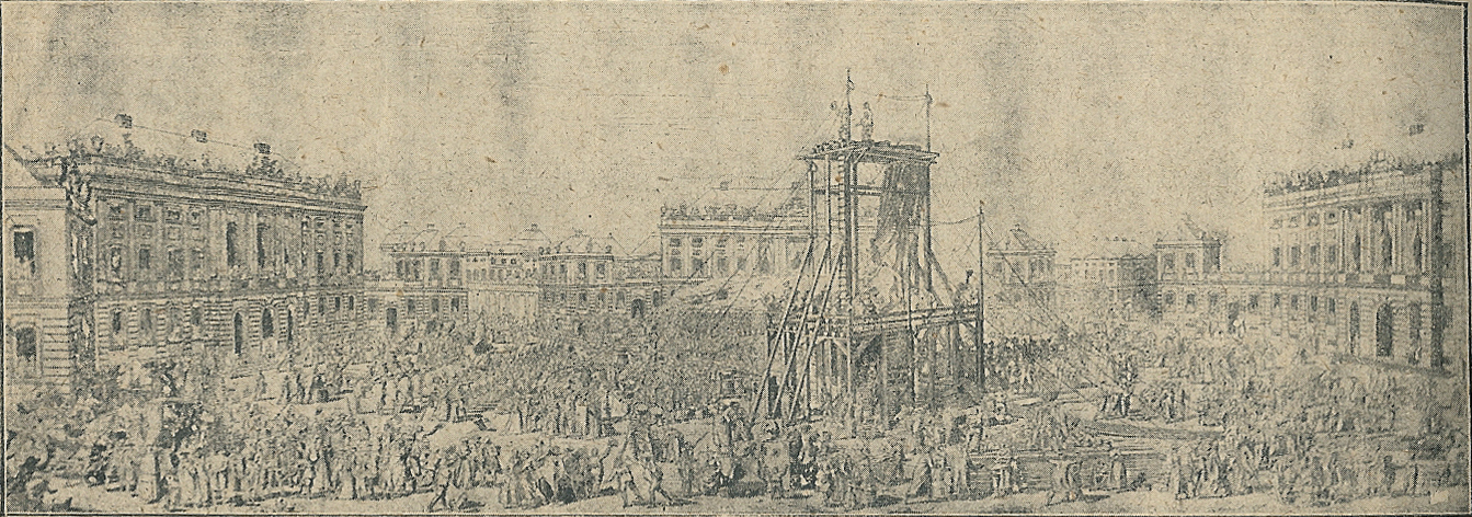 Rytterstatuen af Frederik 5. opstilles på Amalienborg Slotsplads, 17. august 1768. Efter samtidig tegning.